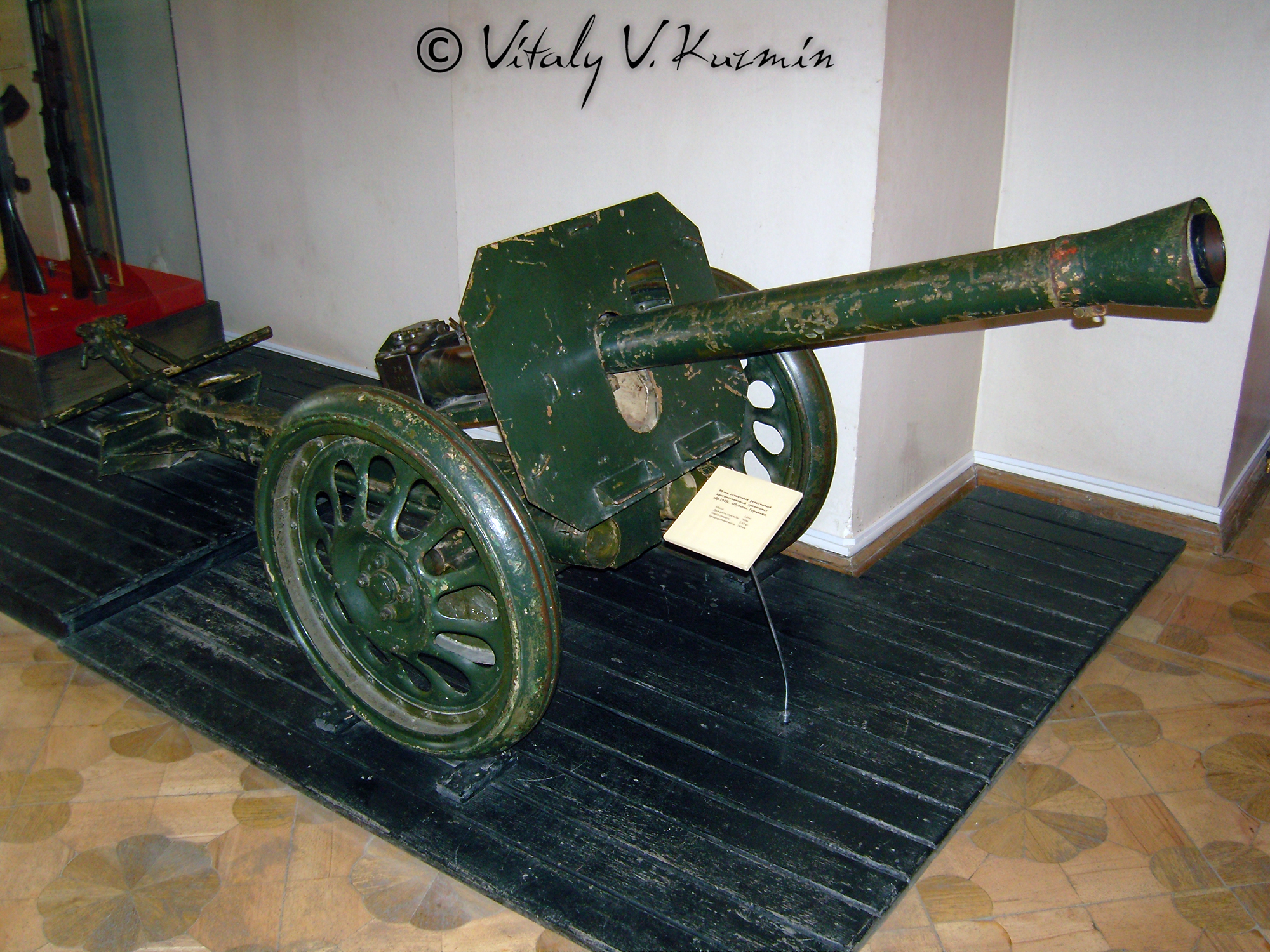 Станковый реактивный противотанковый гранатомет Пупхен (Anti-tank grenade launcher Pupkhen)